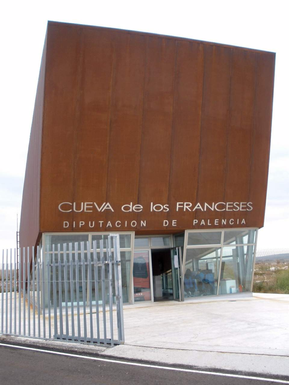 Cueva de los Franceses (Revilla de Pomar, Palencia, España)